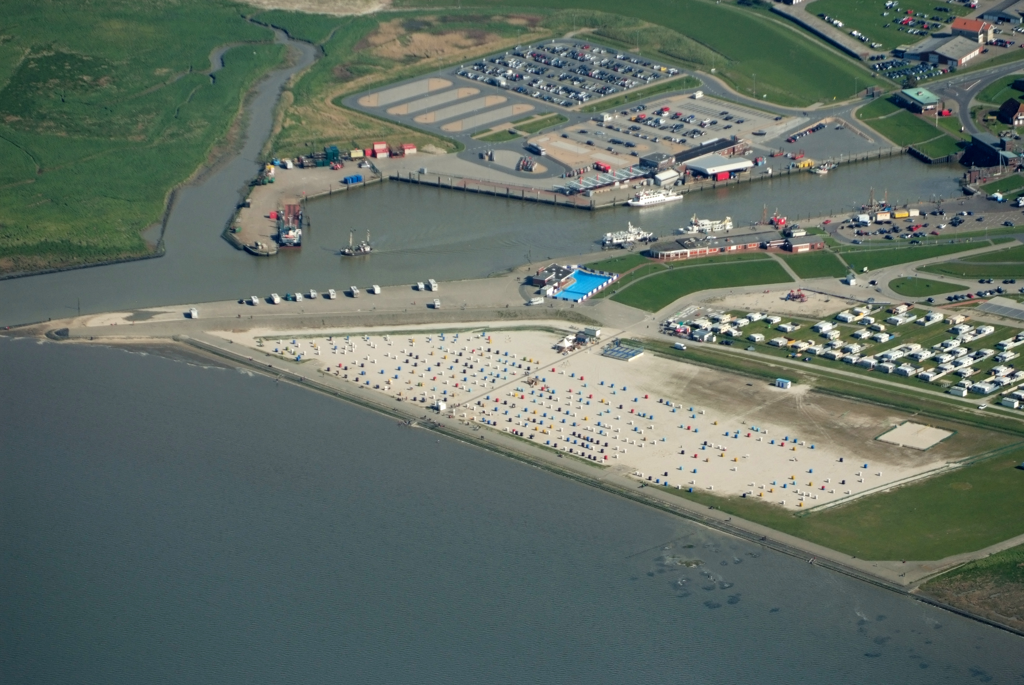 Fotoflug vom Flugplatz Nordholz-Spieka über Bremerhaven, Wilhelmshaven und die Ostfriesischen Inseln bis Borkum Hafen Harlesiel von Nordwesten gesehen